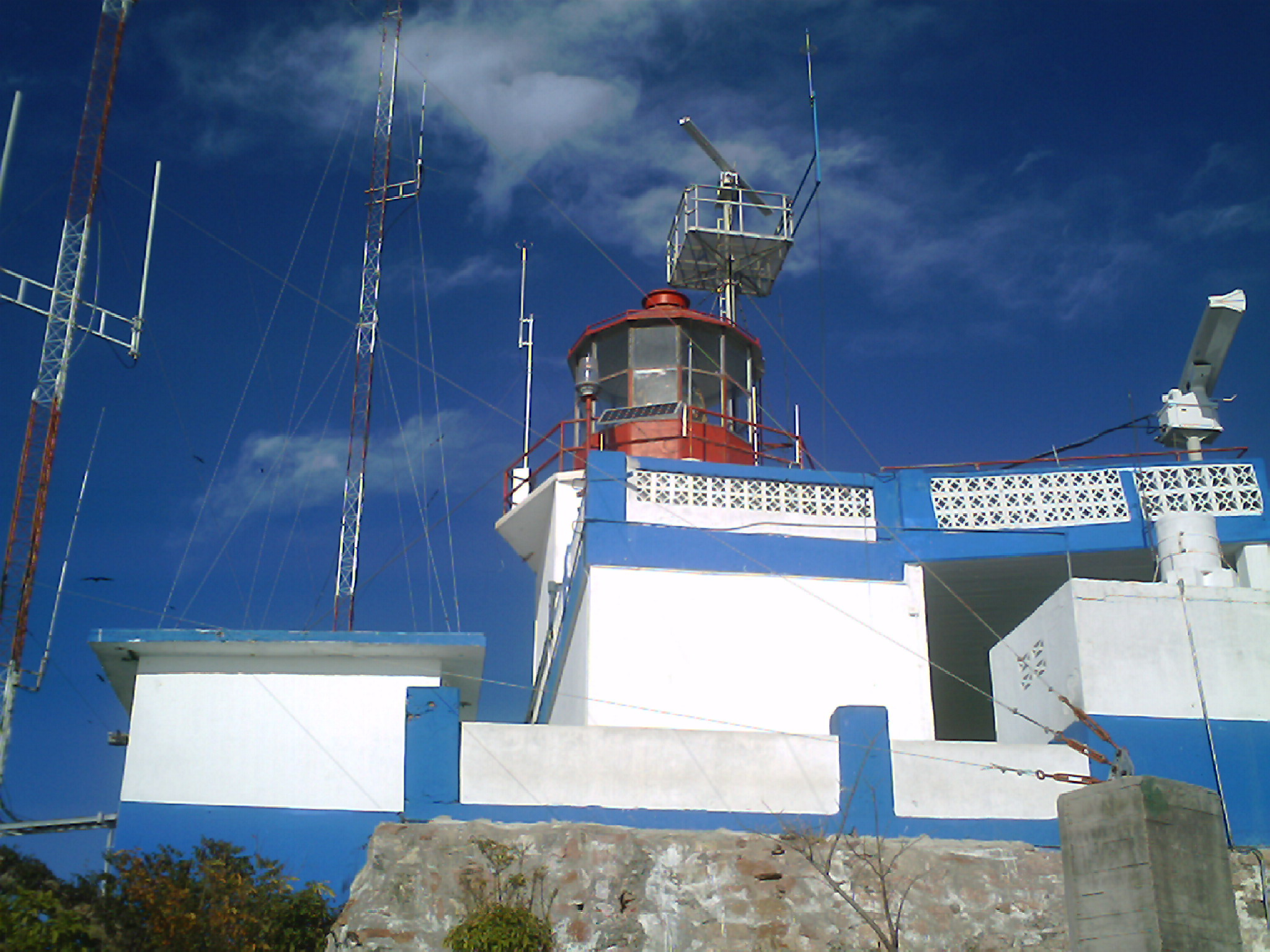 El Faro de Mazatlán visto de cerca